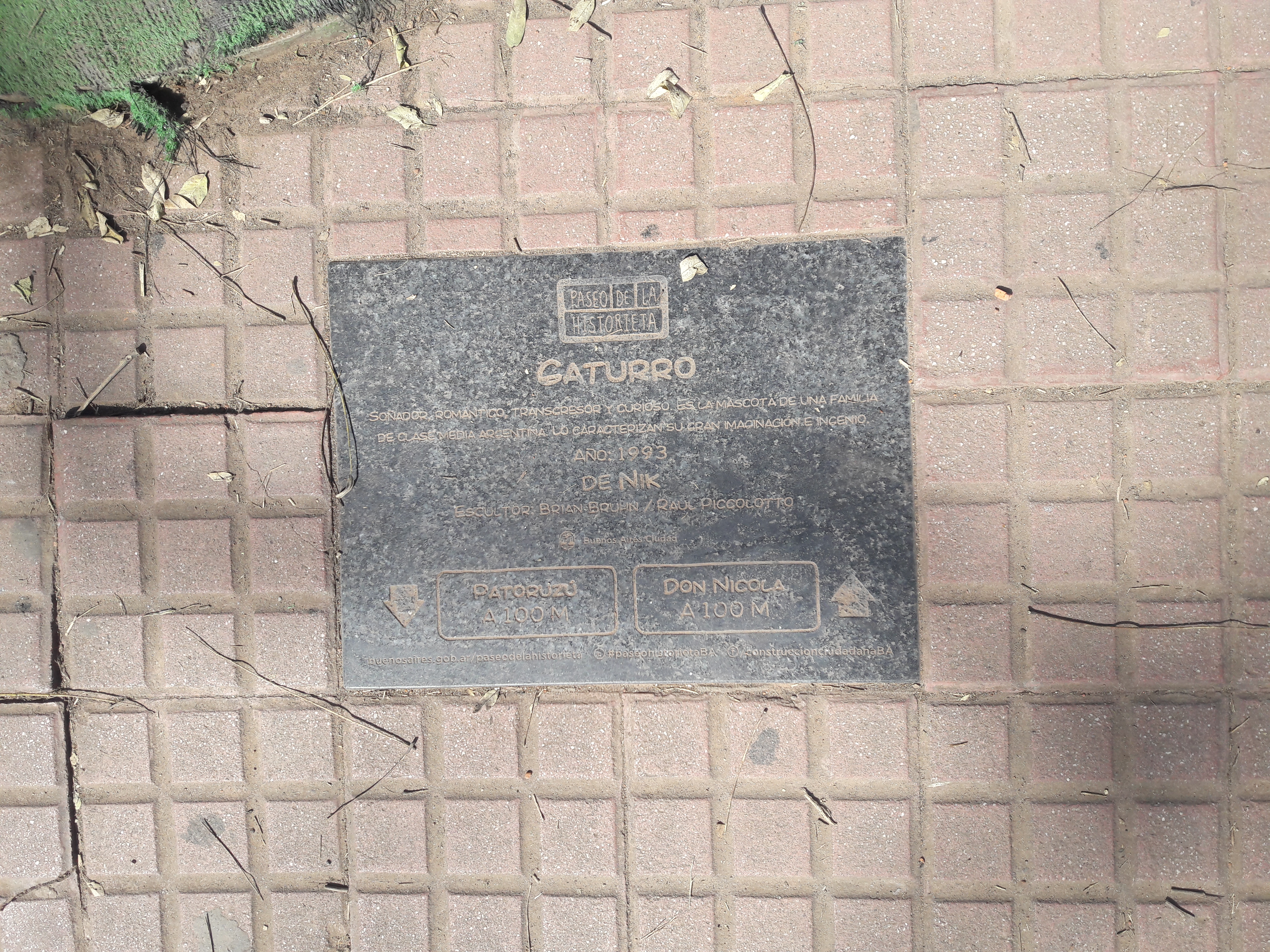 Placa de Gaturro en el Paseo de la Historieta, frente a su estatua.